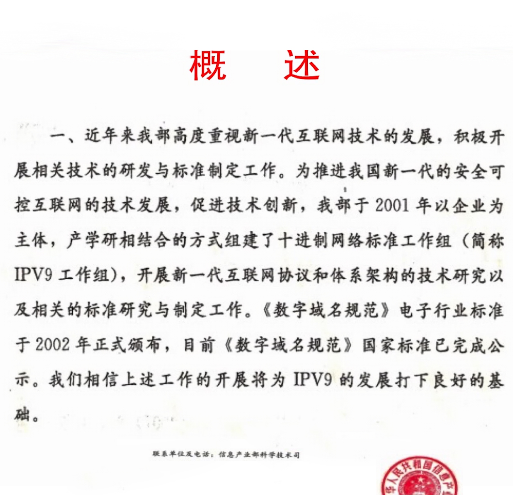 IPV9協定工信部公開文件